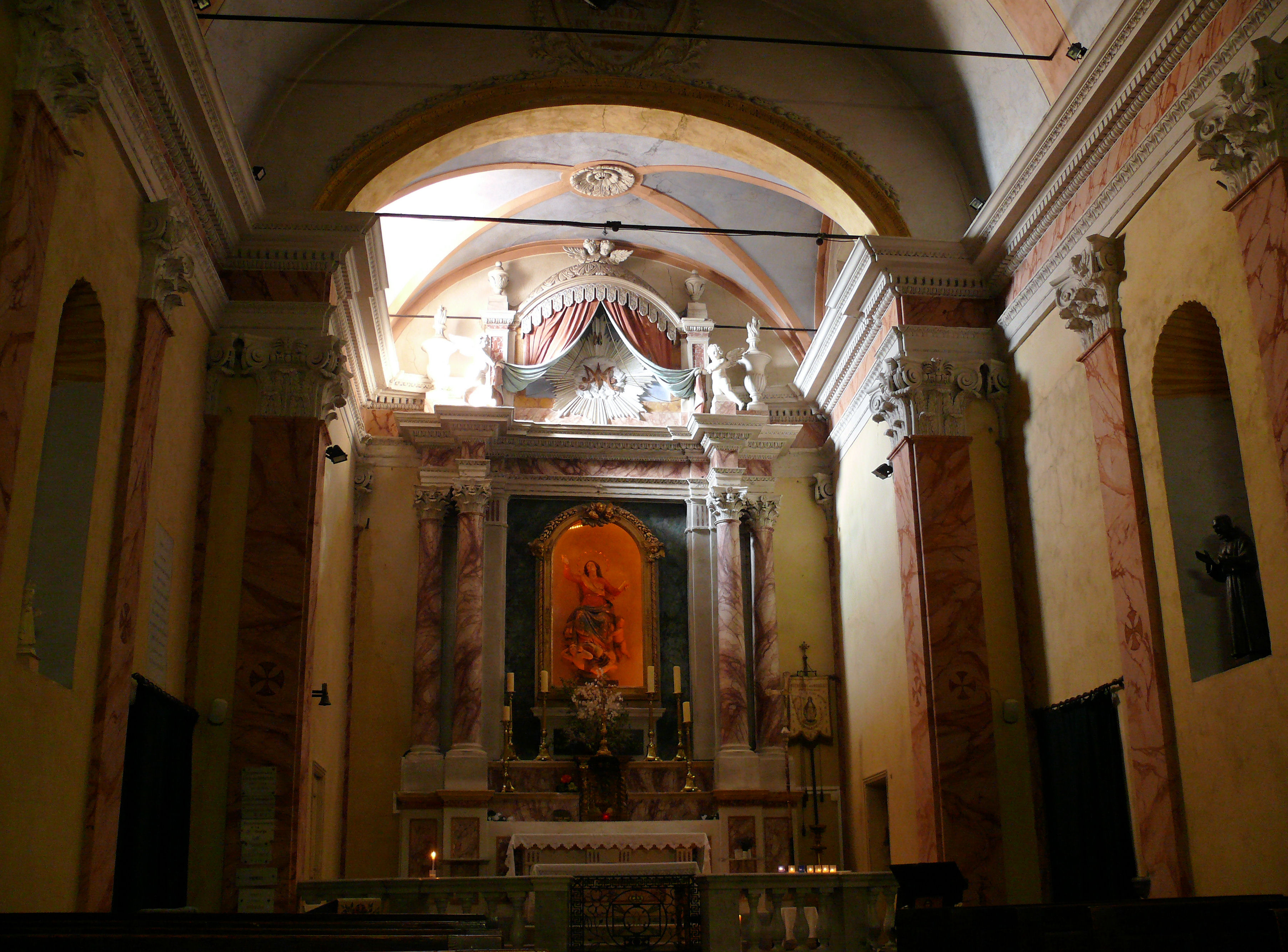 Sanctuaire de la Madone d'Utelle - Nef